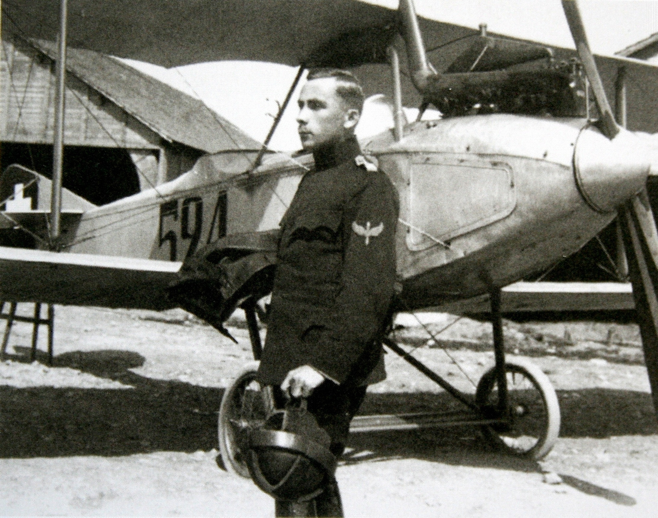 Walter Mittelholzer (1894 - 1937), ca. 1918